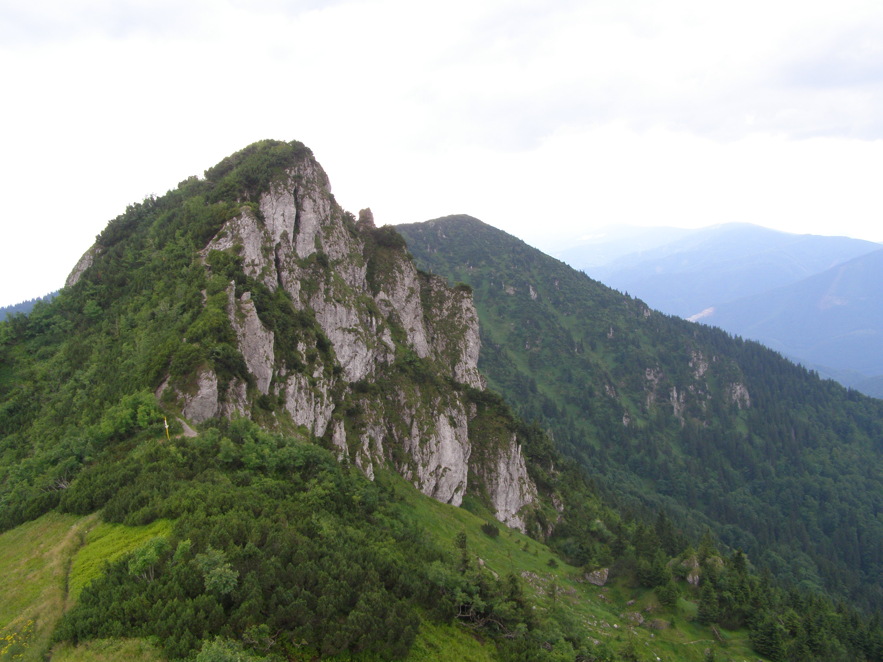 Krivánská Malá Fatra, NPR Suchý, Biele skaly, v pozadí vrchol Suchý (1468 m)